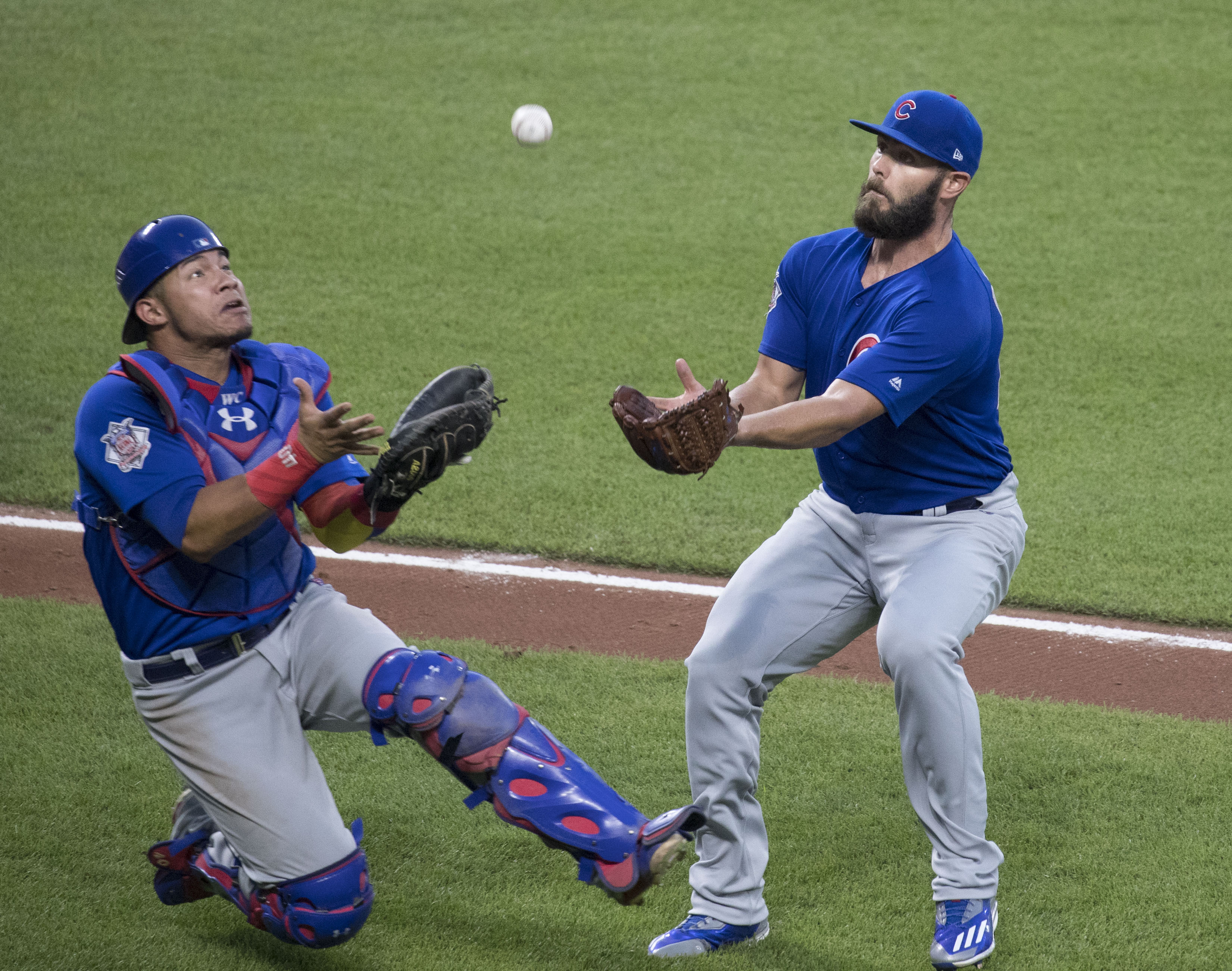 Cubs at Orioles 7/15/17